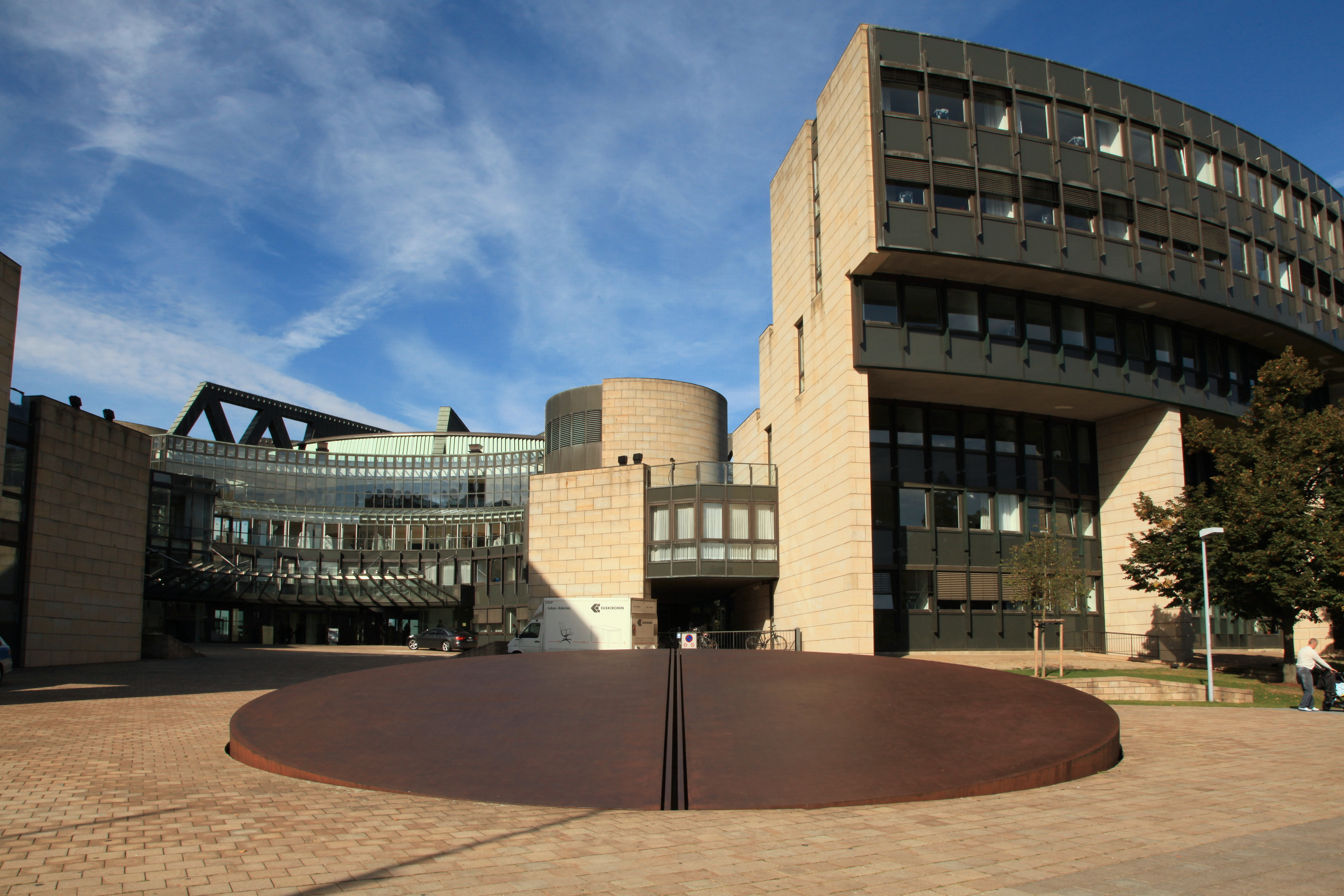 "Tzaphon" von Dani Karavan vor dem Landtagsgebäude am Platz des Landtags in Düsseldorf